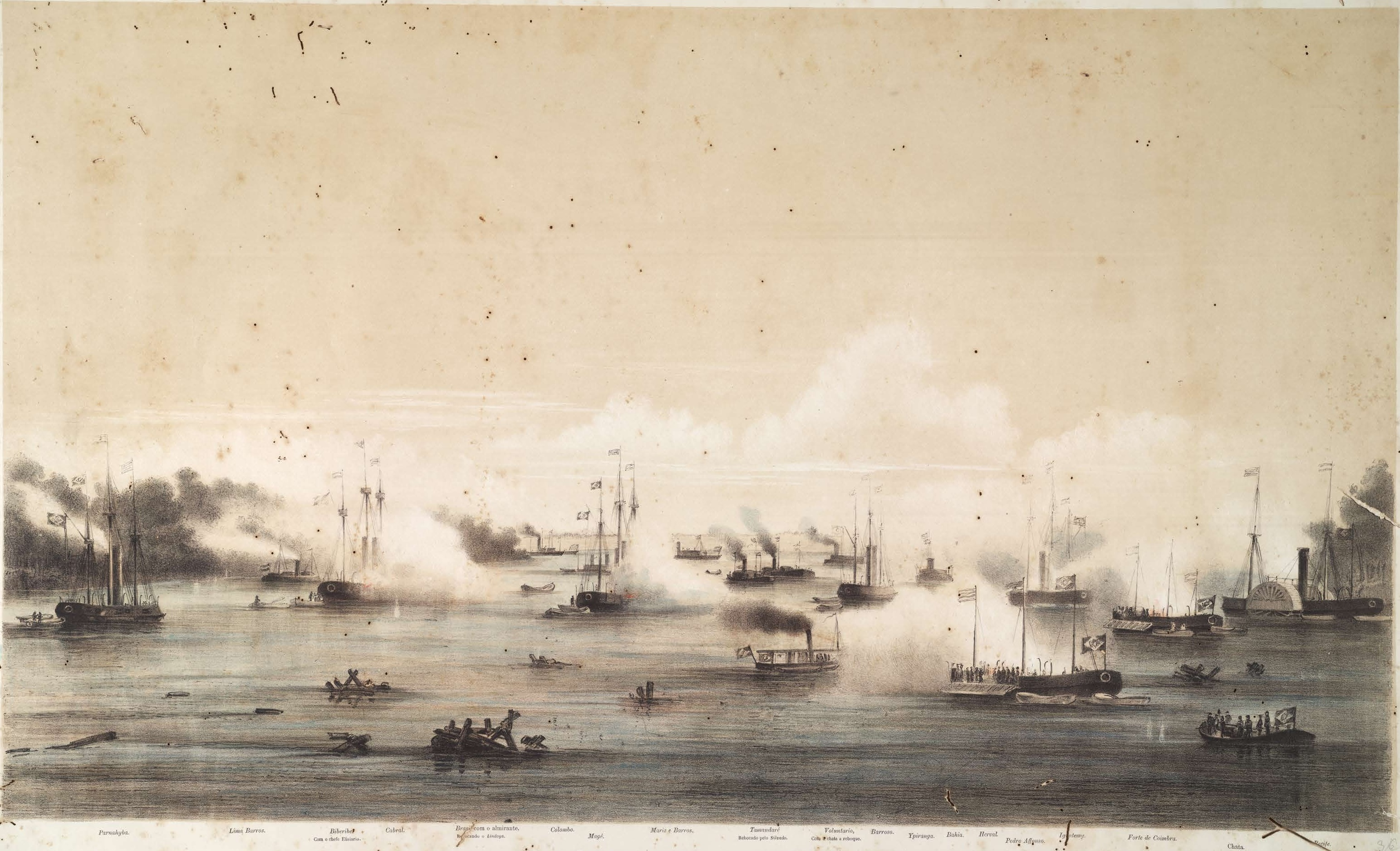 Passagem de Curupaity a 15 de agosto de 1867. Efetuada pela esquadra encouraçada sob o mando do almirante Joaquim José Ignacio, hoje barão de Inhaúma